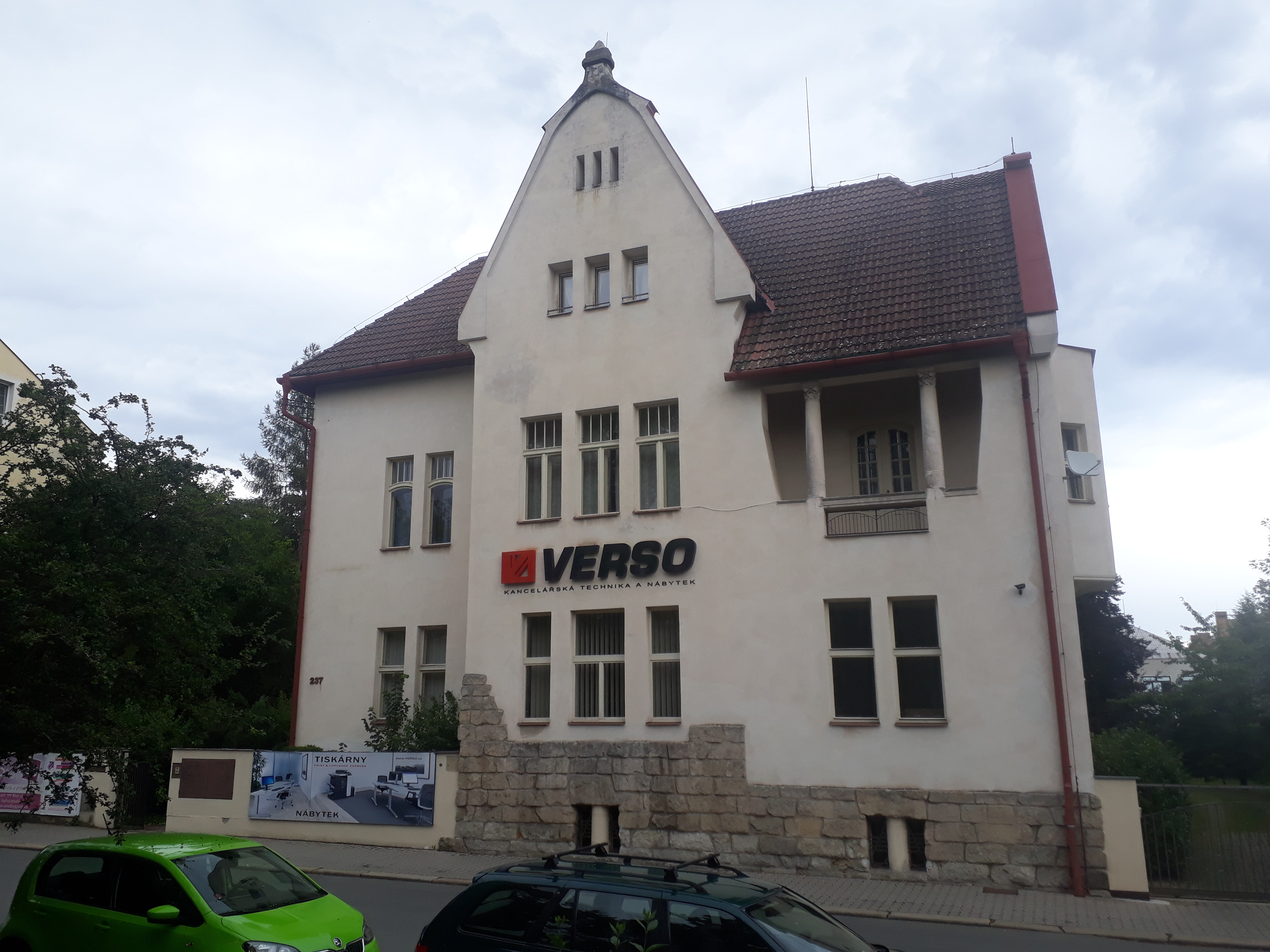 Vila, kterou roku 1908 nechal pro svou rodinu postavit Václav Klement, spolumajitel automobilového závodu Laurin & Klement (později Škoda Auto). Husova ulice 237/25, Mladá Boleslav.